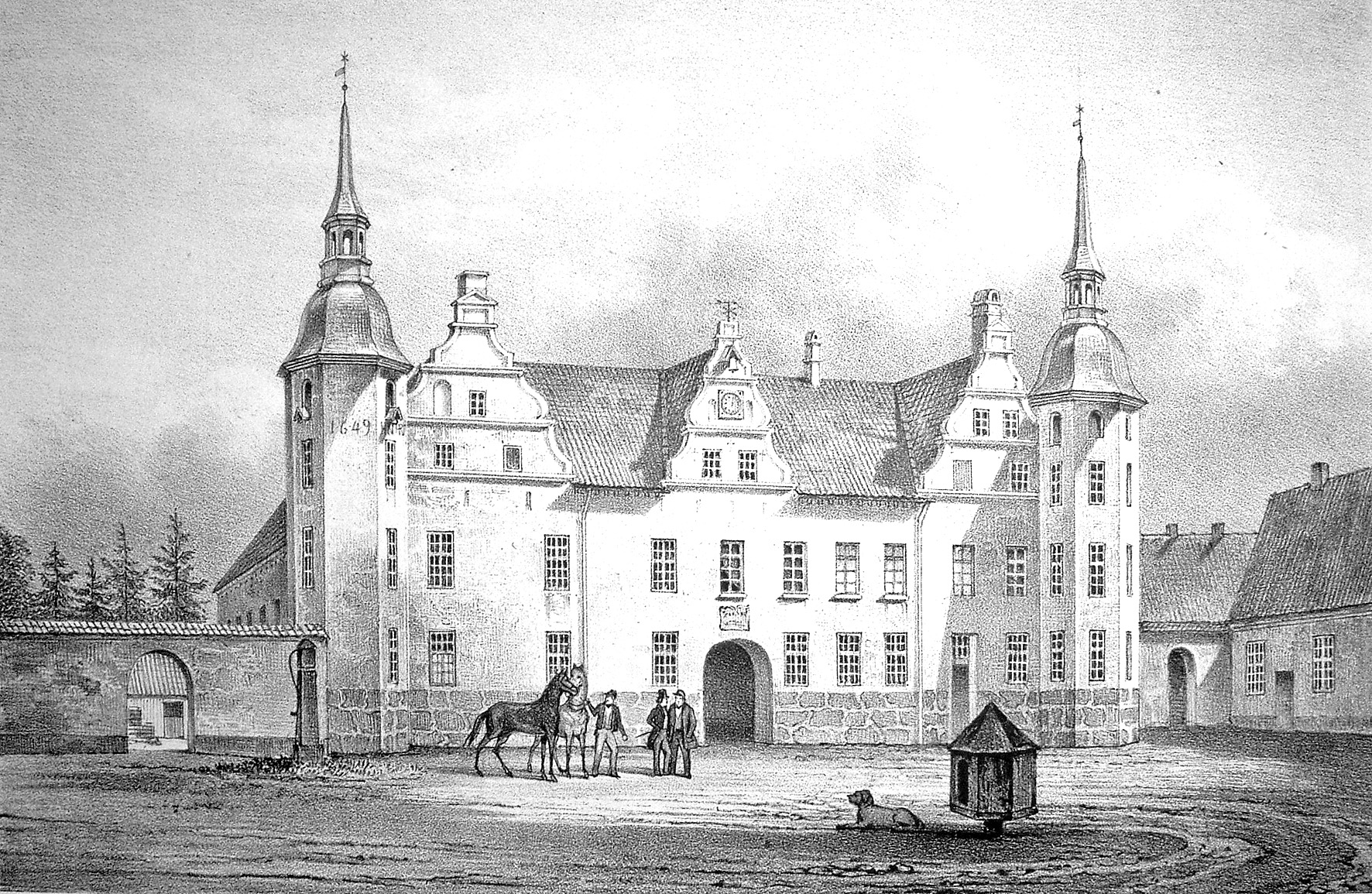 Holsteinborg er en gammel sædegård fra 1357, som under navnet Braade var en Hovedgård under Roskilde bispestol. Gården ligger i Holsteinborg Sogn i Slagelse Kommune. Hovedbygningen er opført i 1598-1639-1649